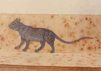 Photo d'une page du Smud Khoi à la Bibliothèque Nationale de Bangkok, Thaïlande. Représentation d'un Korat.